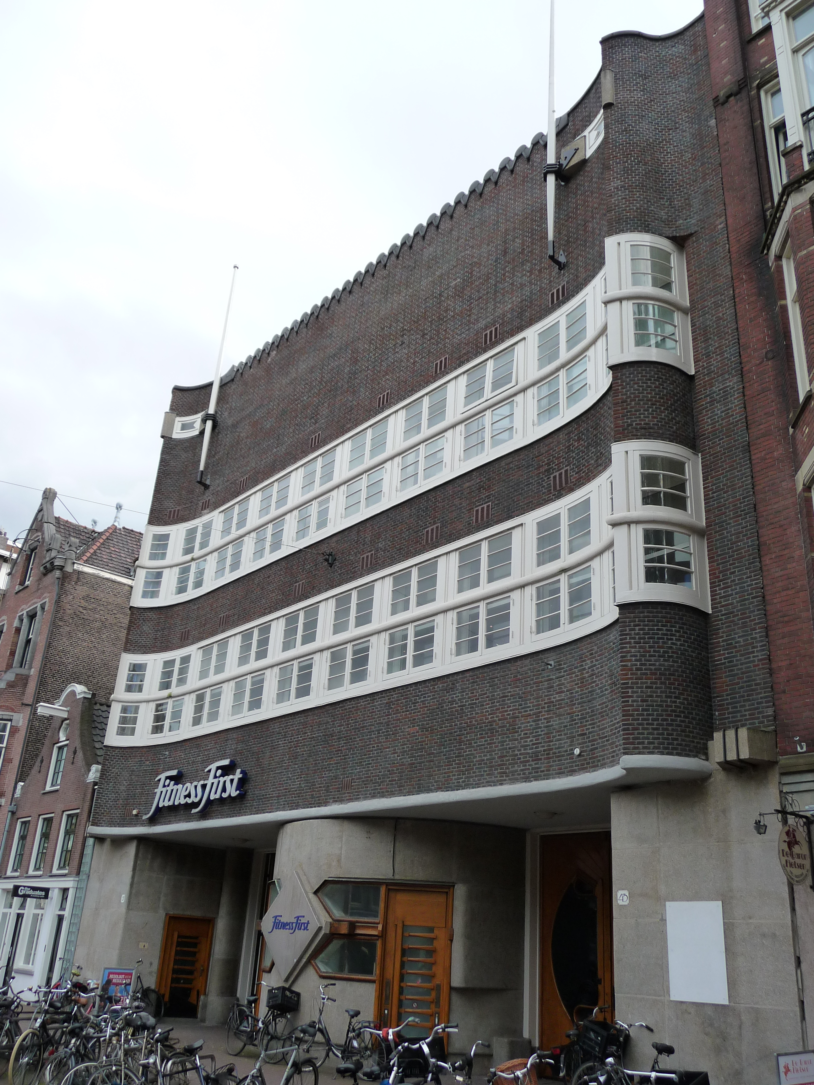 Rijksmonument Overtoom 39, Amsterdam